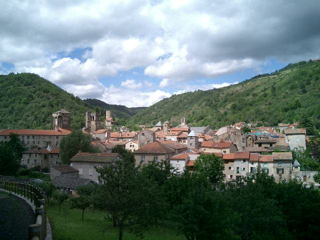 Vue générale de Blesle